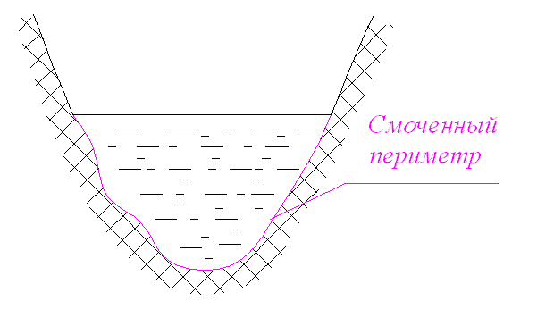 Рисунок поямняет значение понятия "смоченный периметр"